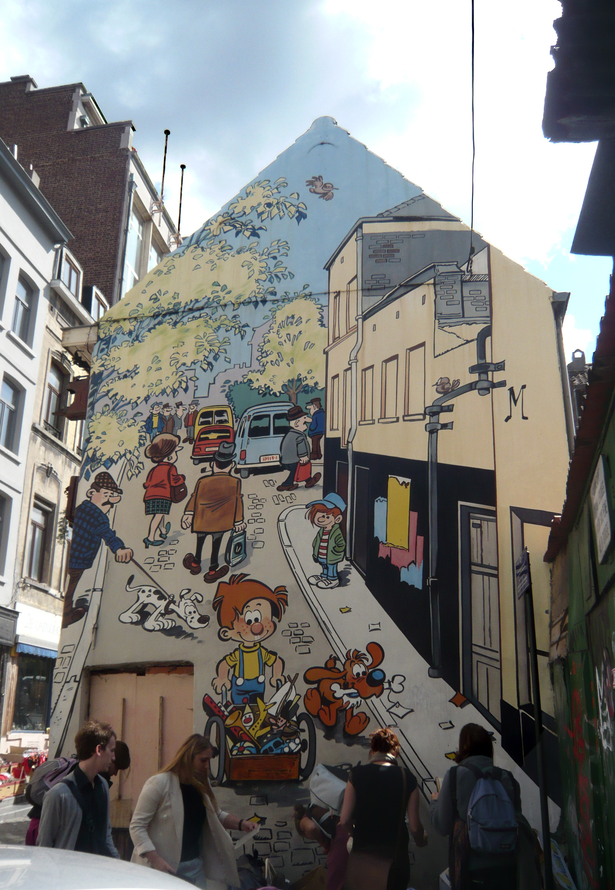 Boule & Bill-Wandgemälde in der Rue du Chevreuil in Brüssel (Parcours bande dessinée)[1]